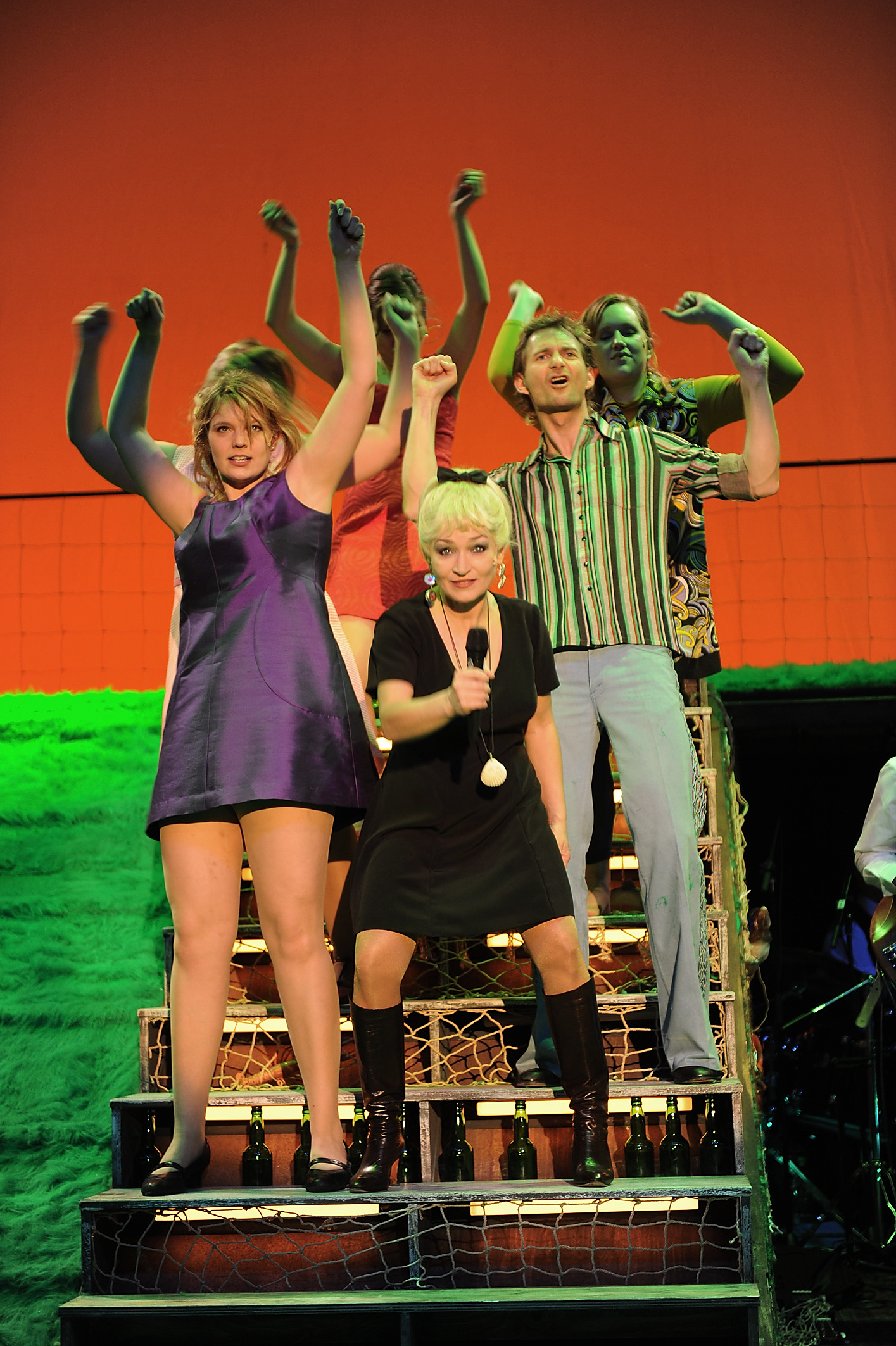 Musical "Meta, Norddeich" Landesbühne Niedersachsen Nord